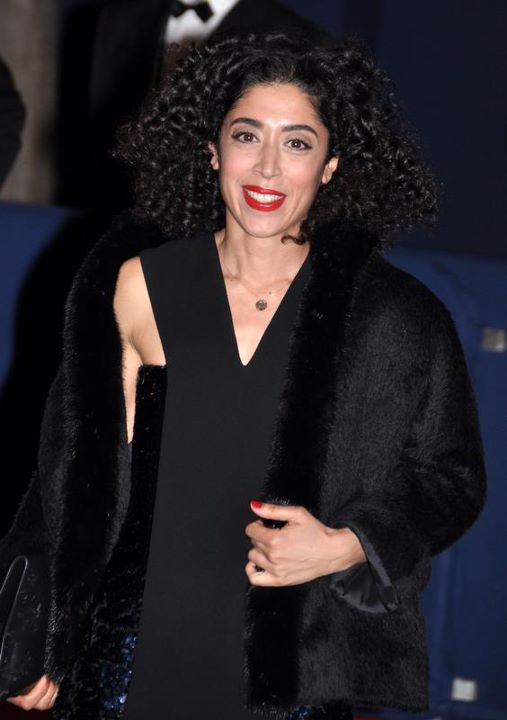 Naidra Ayadi à la cérémonie des César